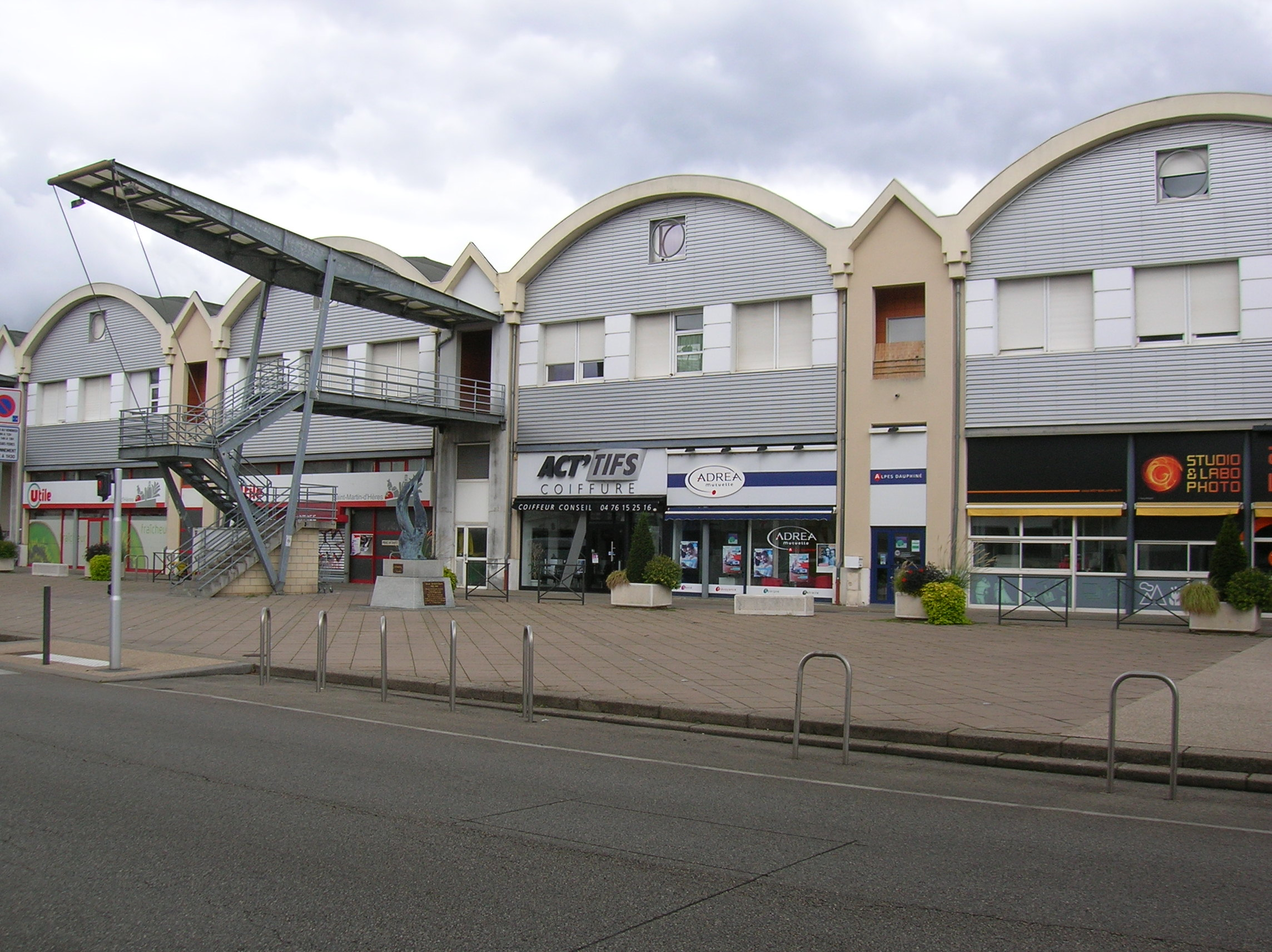 L'ancienne biscuiterie Brun (halles Brun), avenue Ambroise-Croizat à Saint-Martin-d'Hères, Isère, France. Aujourd'hui, place du 24 Avril 1915, avec commerces de proximité. Au centre, sculpture à la mémoire des victimes du Génocide arménien, intitulée « Éternité », réalisée en laiton par R. Toros.